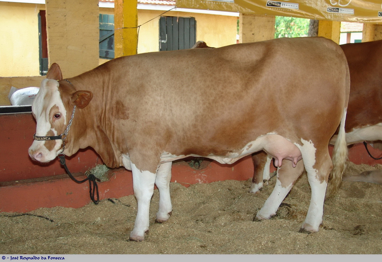 Gados em exposição na EMAPA, Avaré, estado de São Paulo, Brasil